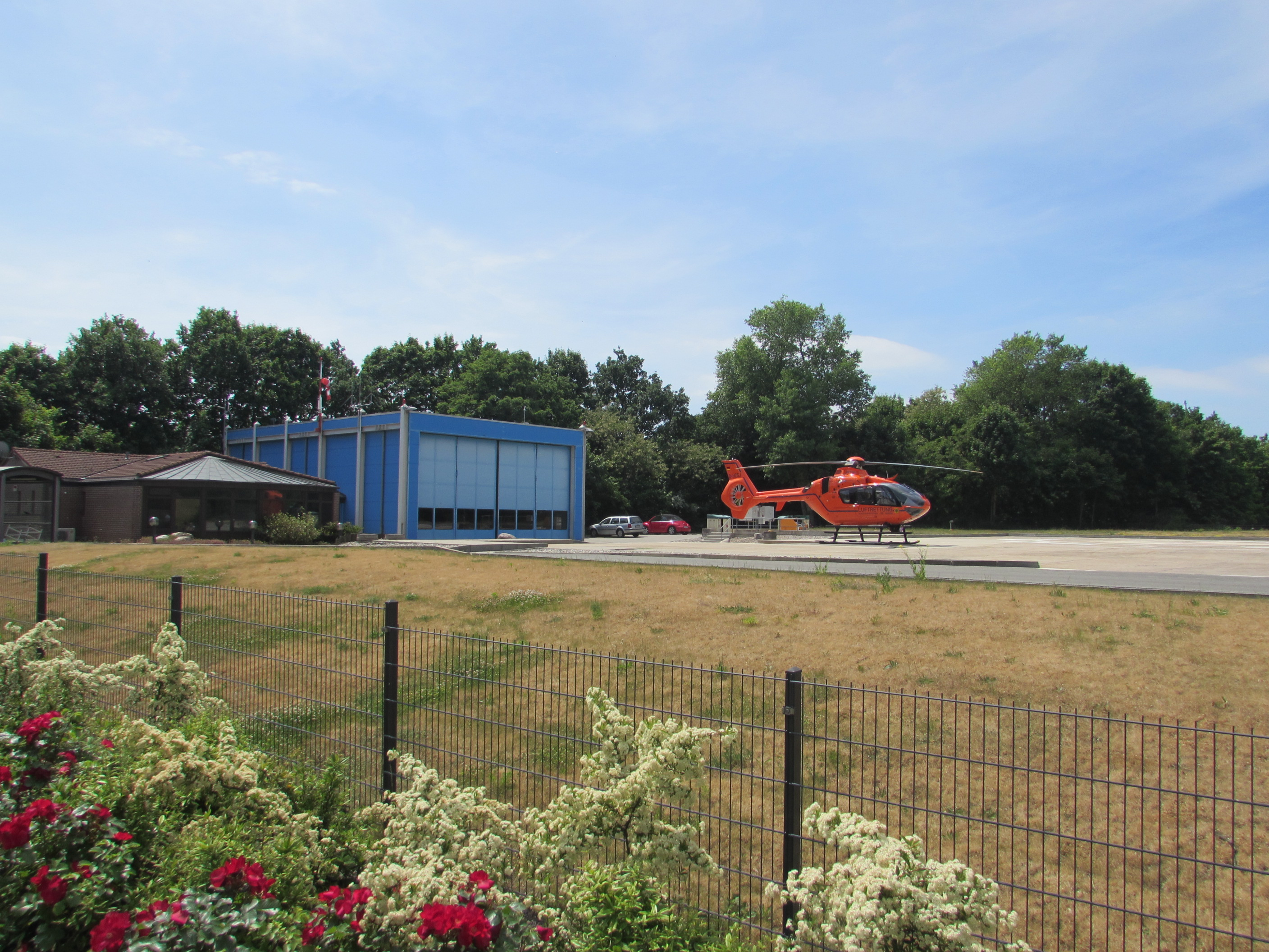 flugplatz mit hangarhalle, christoph 35, marienberg brandneburg